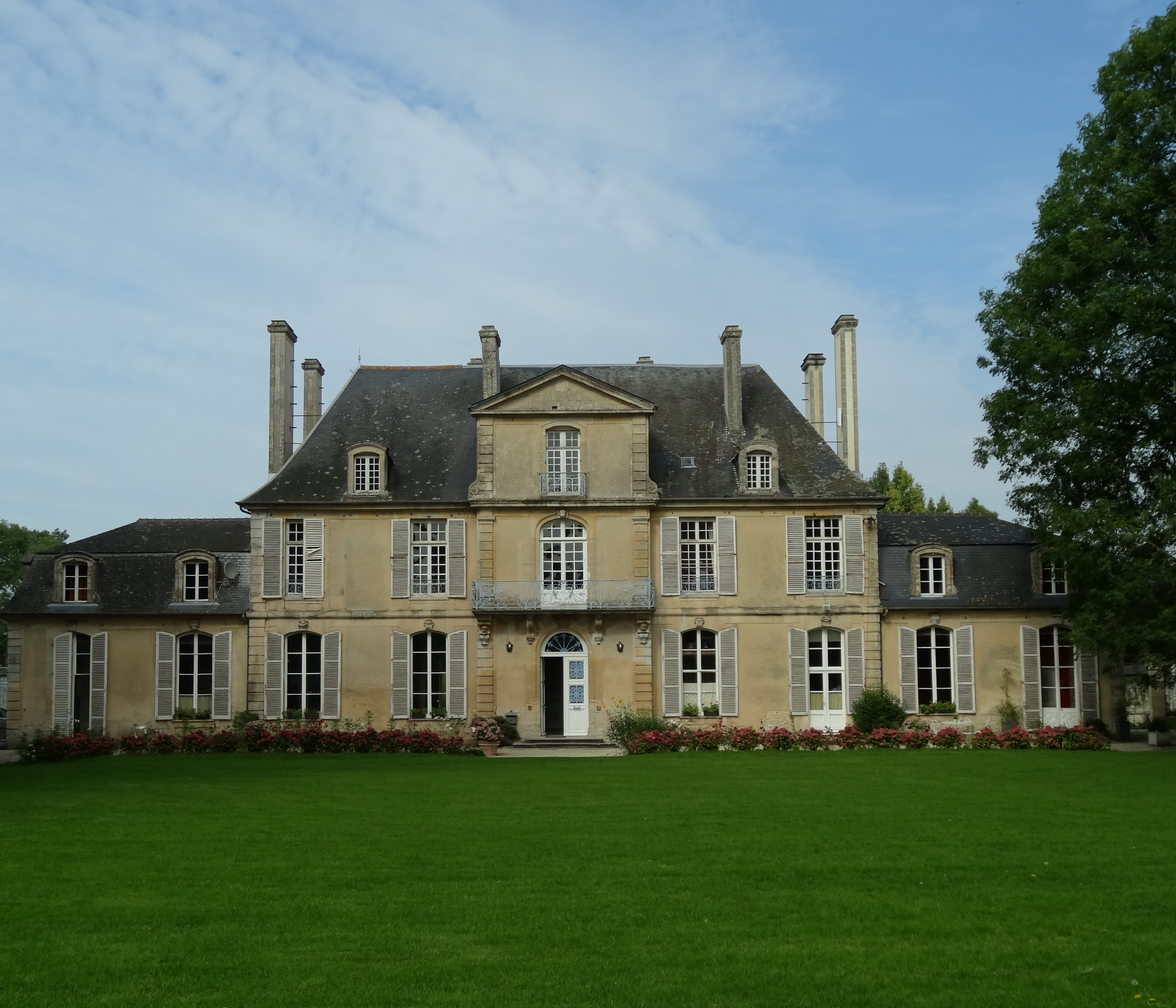 Façade sud du Château de Martragny